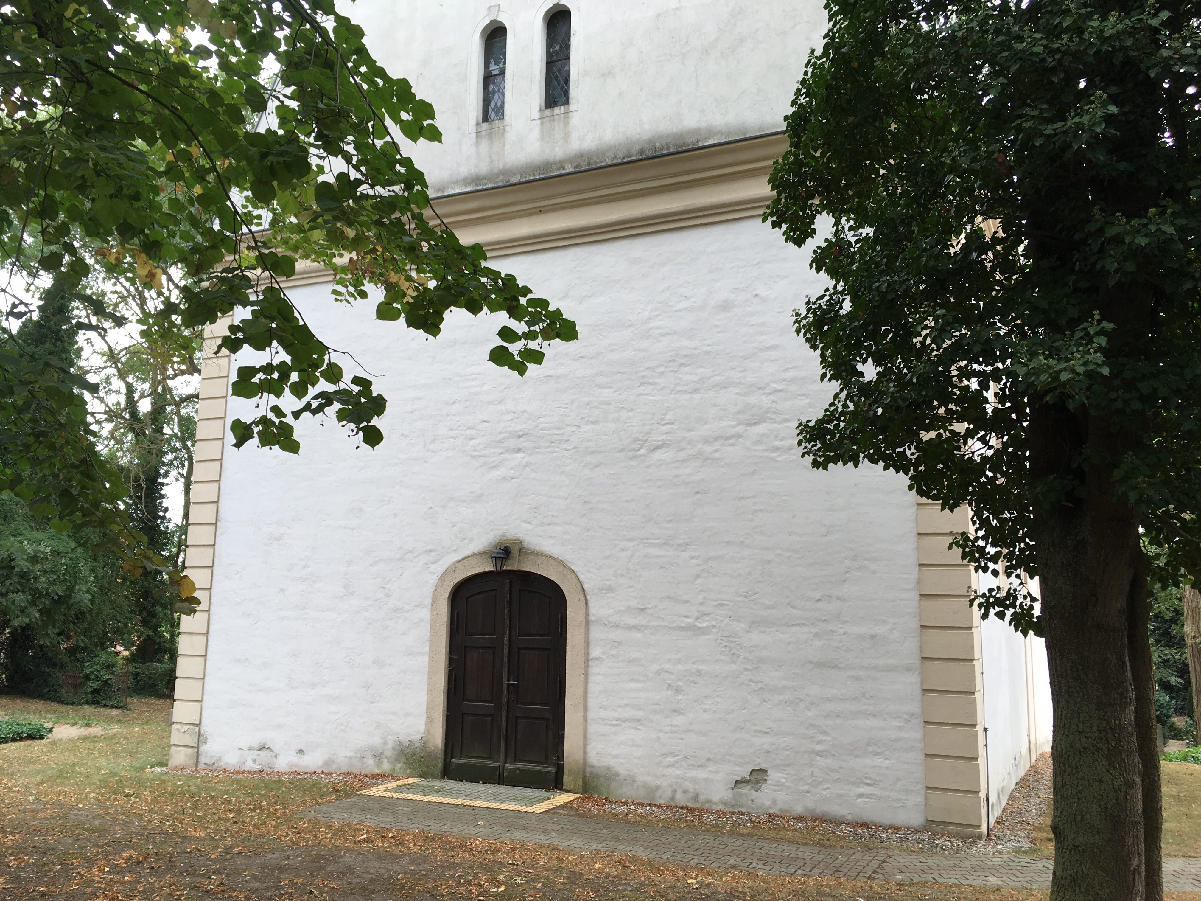 Die Saalkirche in Schenkenberg entstand im Kern im Jahr 1685 und wurde bei einem Brand im Jahr 1900 weitgehend zerstört. Anschließend errichtete die Kirchengemeinde das Bauwerk neu auf; es wurde um 2000 restauriert.